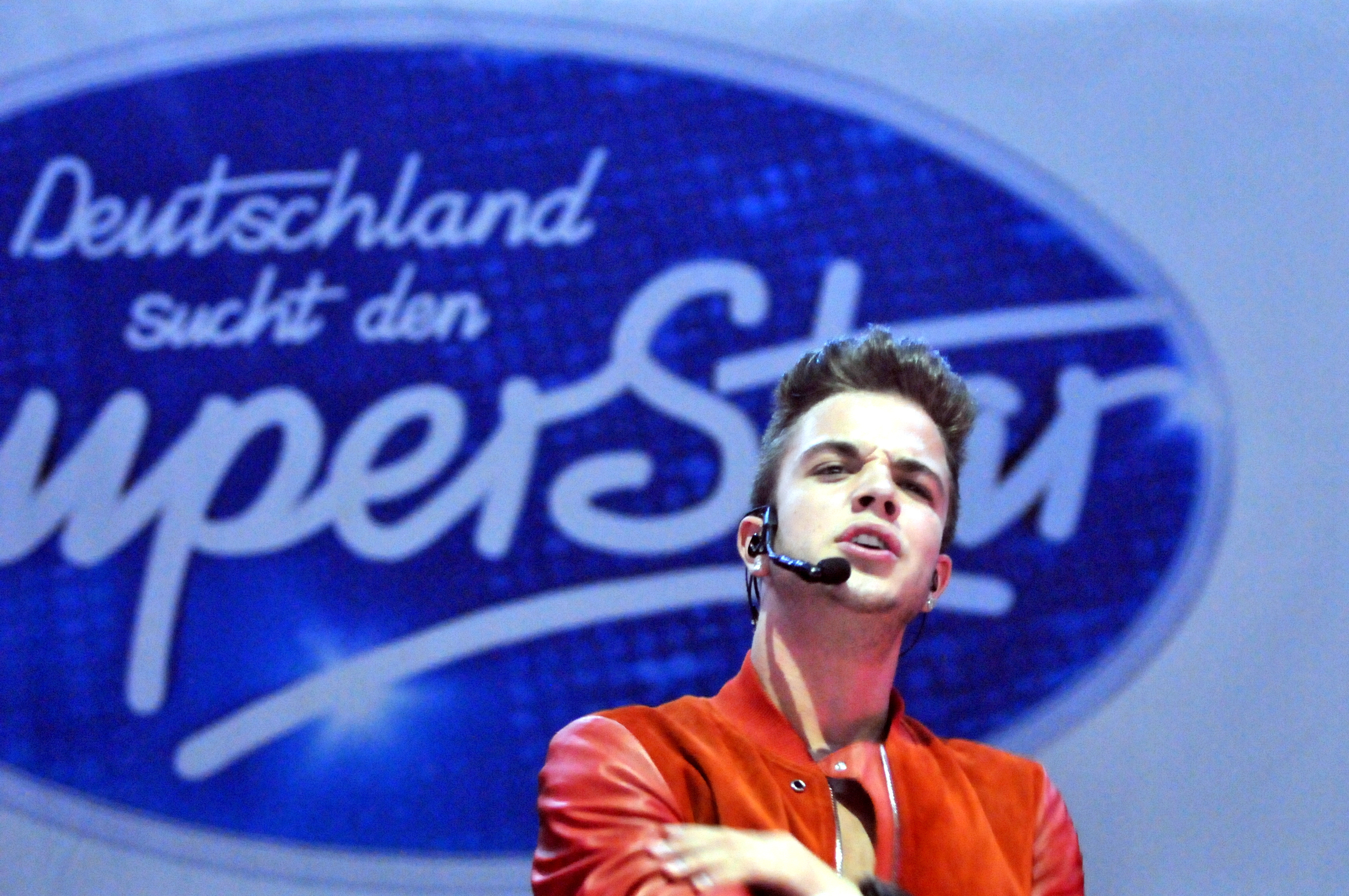 DSDS - Live on Tour. 27. Juli 2014, Stadthalle Wien.